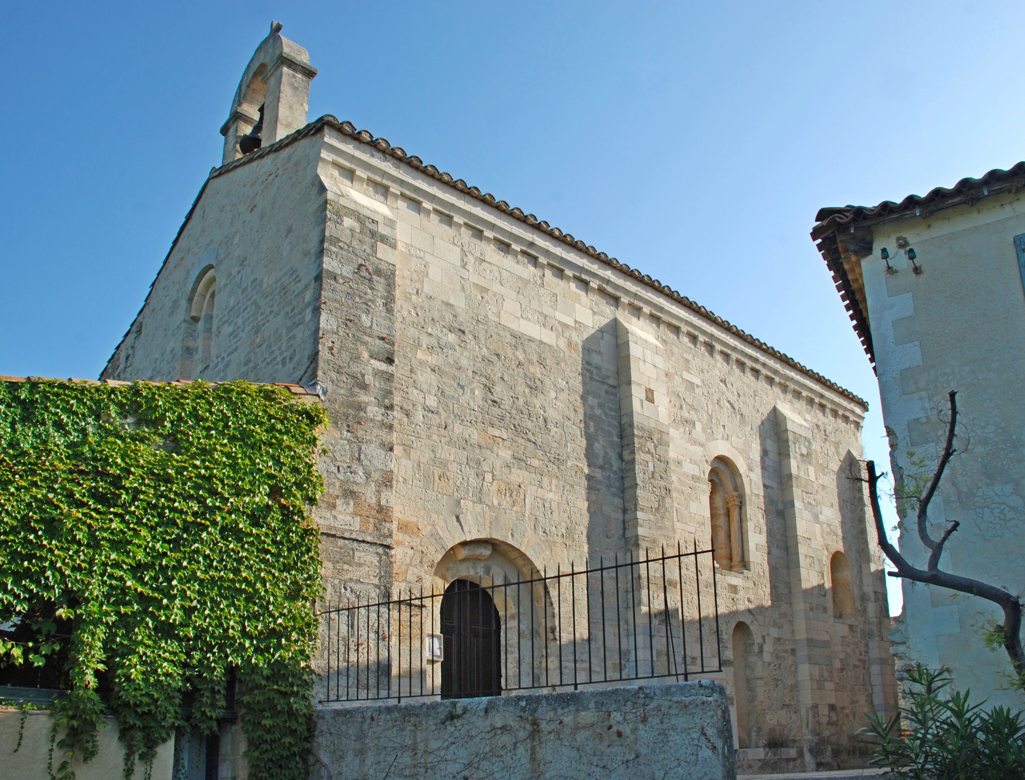 France - Hérault - Église Saint-Martin de Campagne